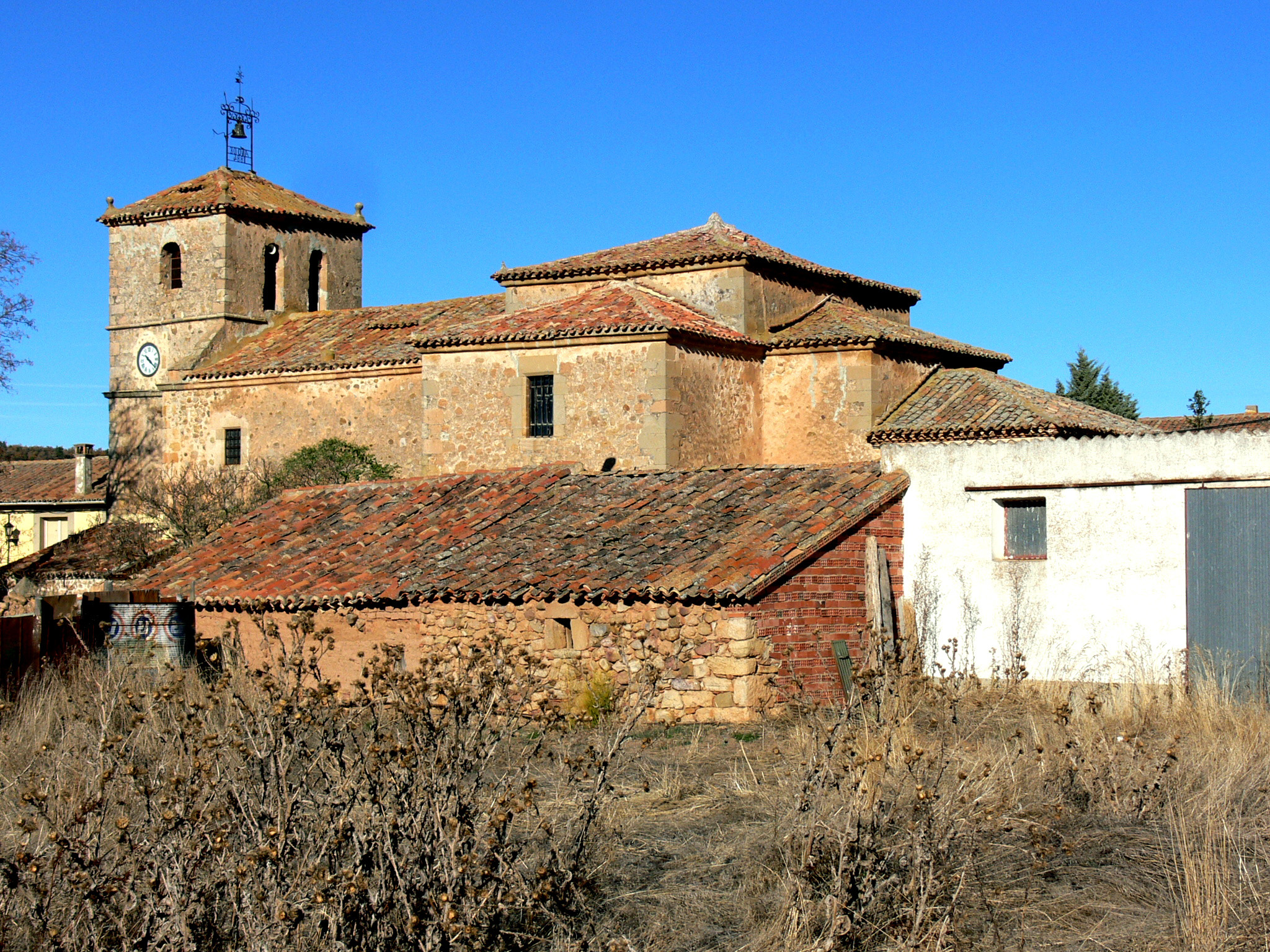 Iglesia Parroquial de San Martín (sXIX).